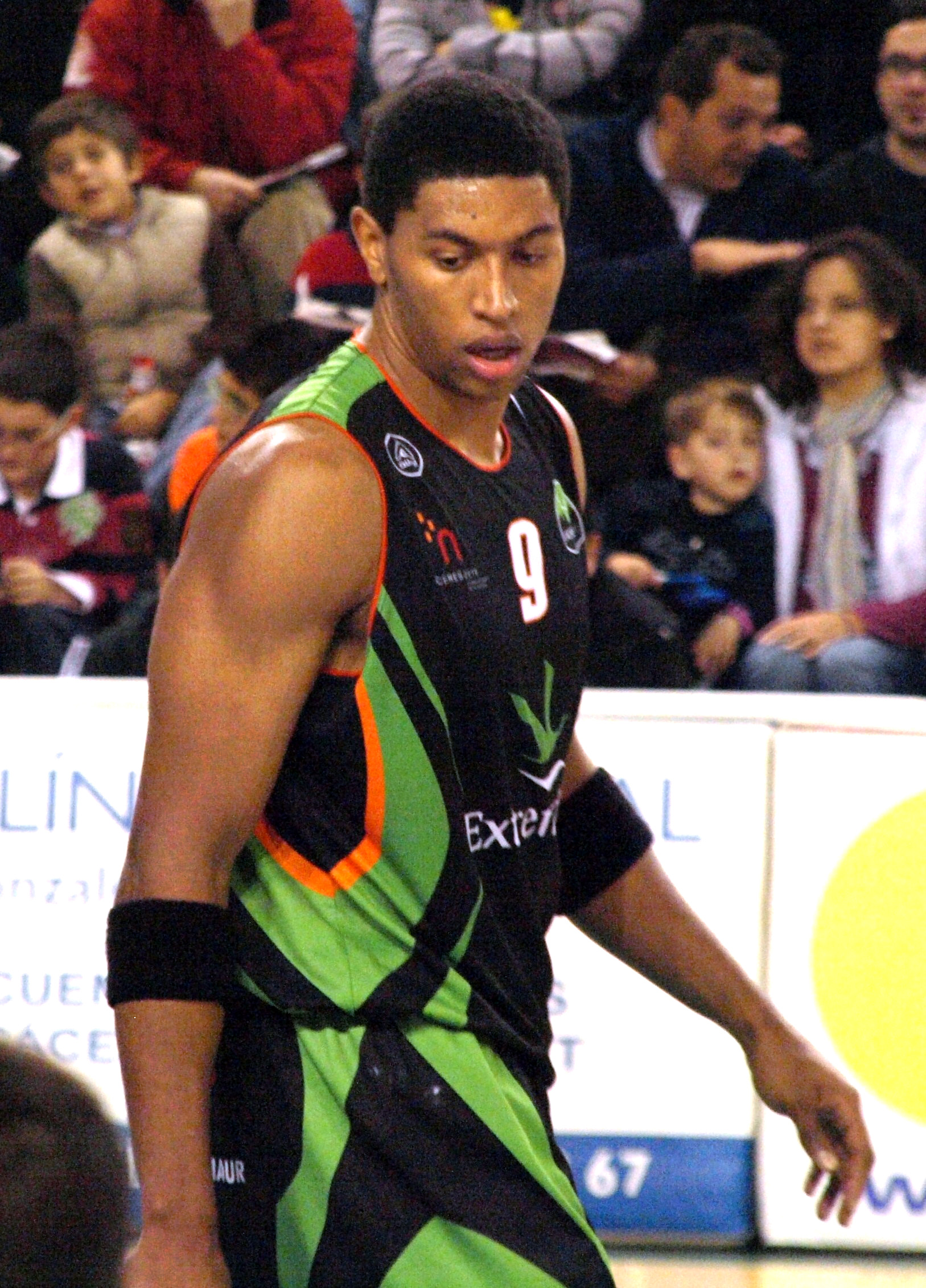 Wayne Simien del Cáceres 2016 en el partido de liga LEB de la temporada 2008/09 disputado en el Pabellón Multiusos "Ciudad de Cáceres" ante el Plus Pujol Lleida